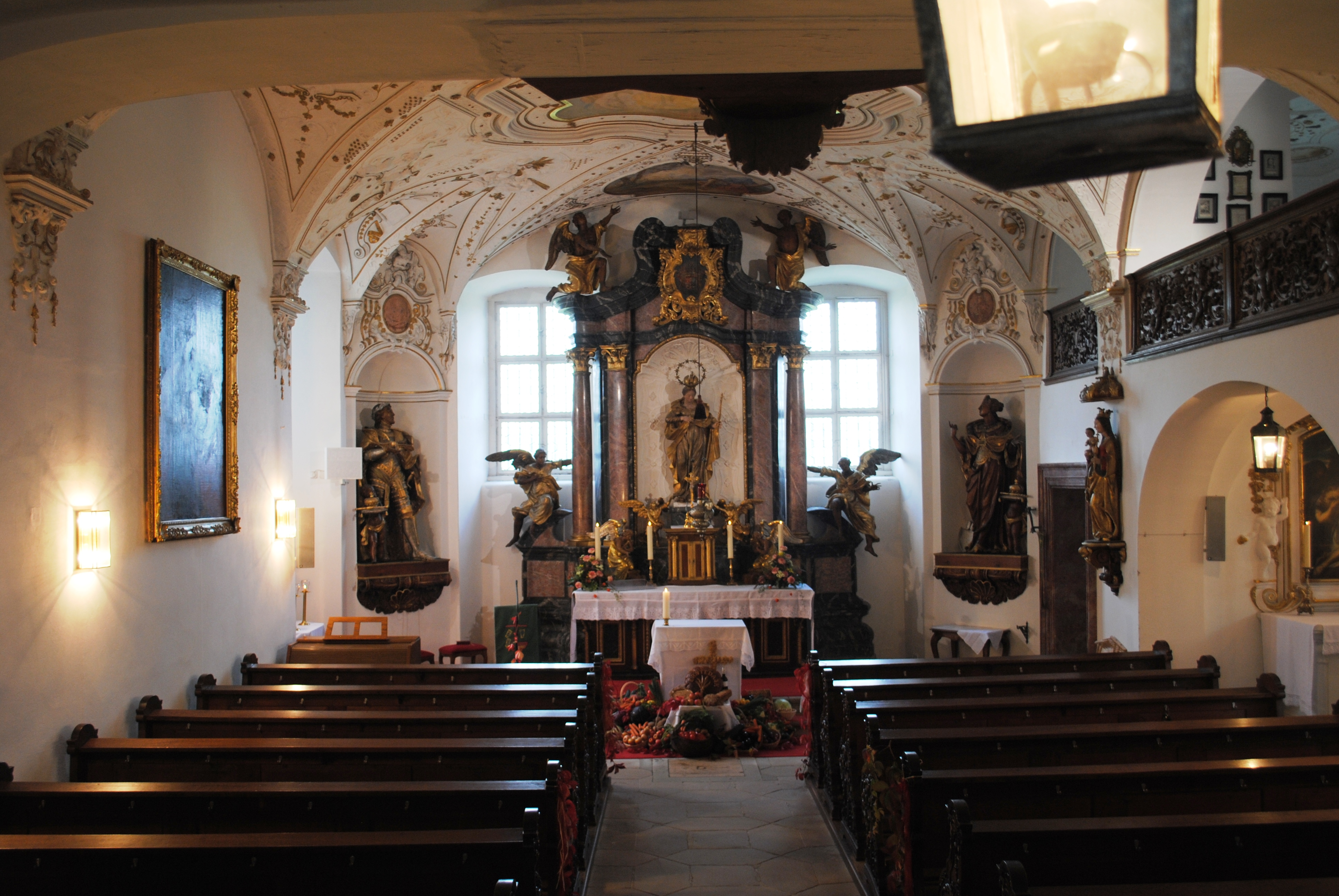 Innenraum, Schlosskirche, Schloss Weißenstein